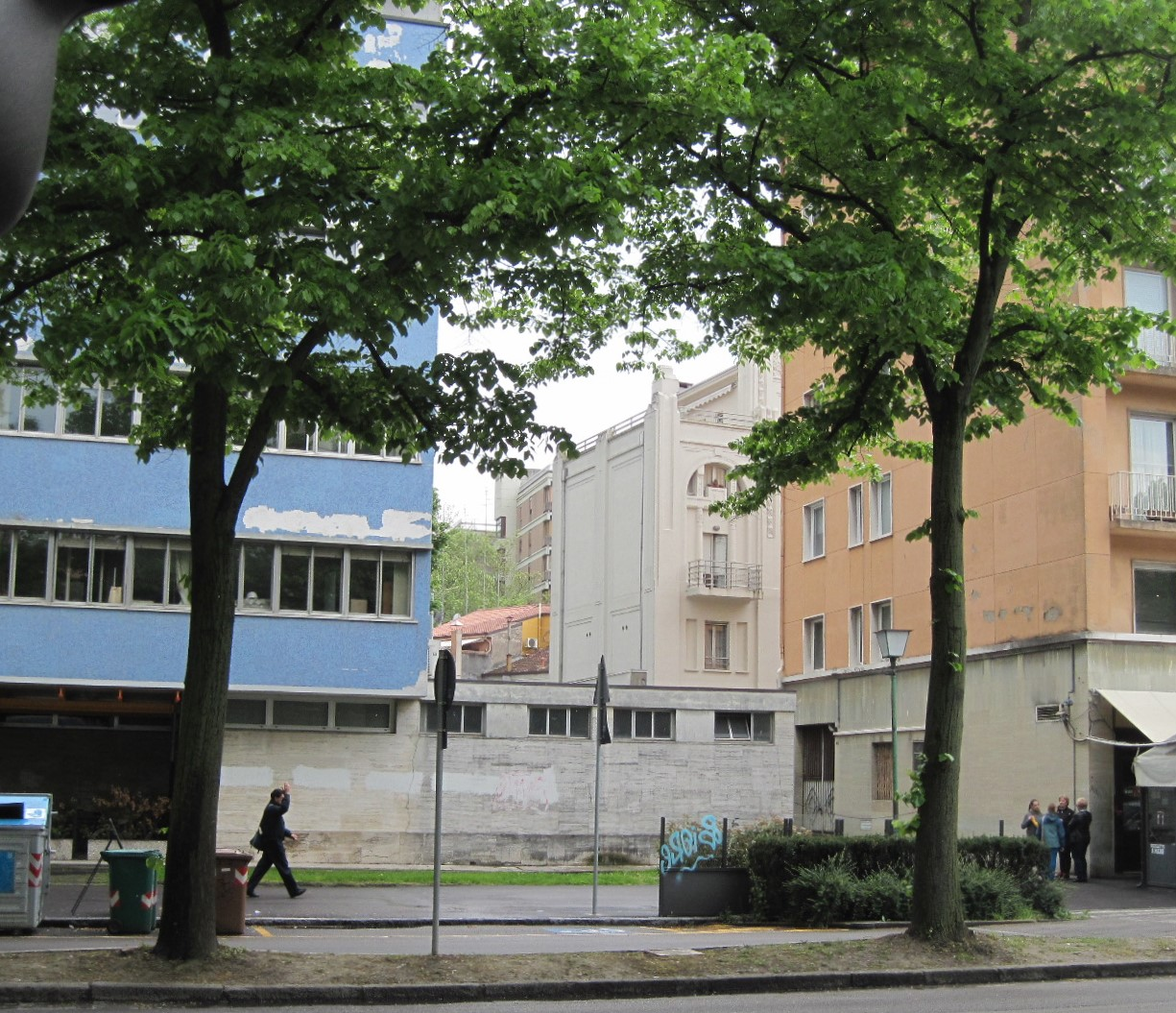 Palazzo Panfilio, vista parziale della facciata dal lato di viale Cavour